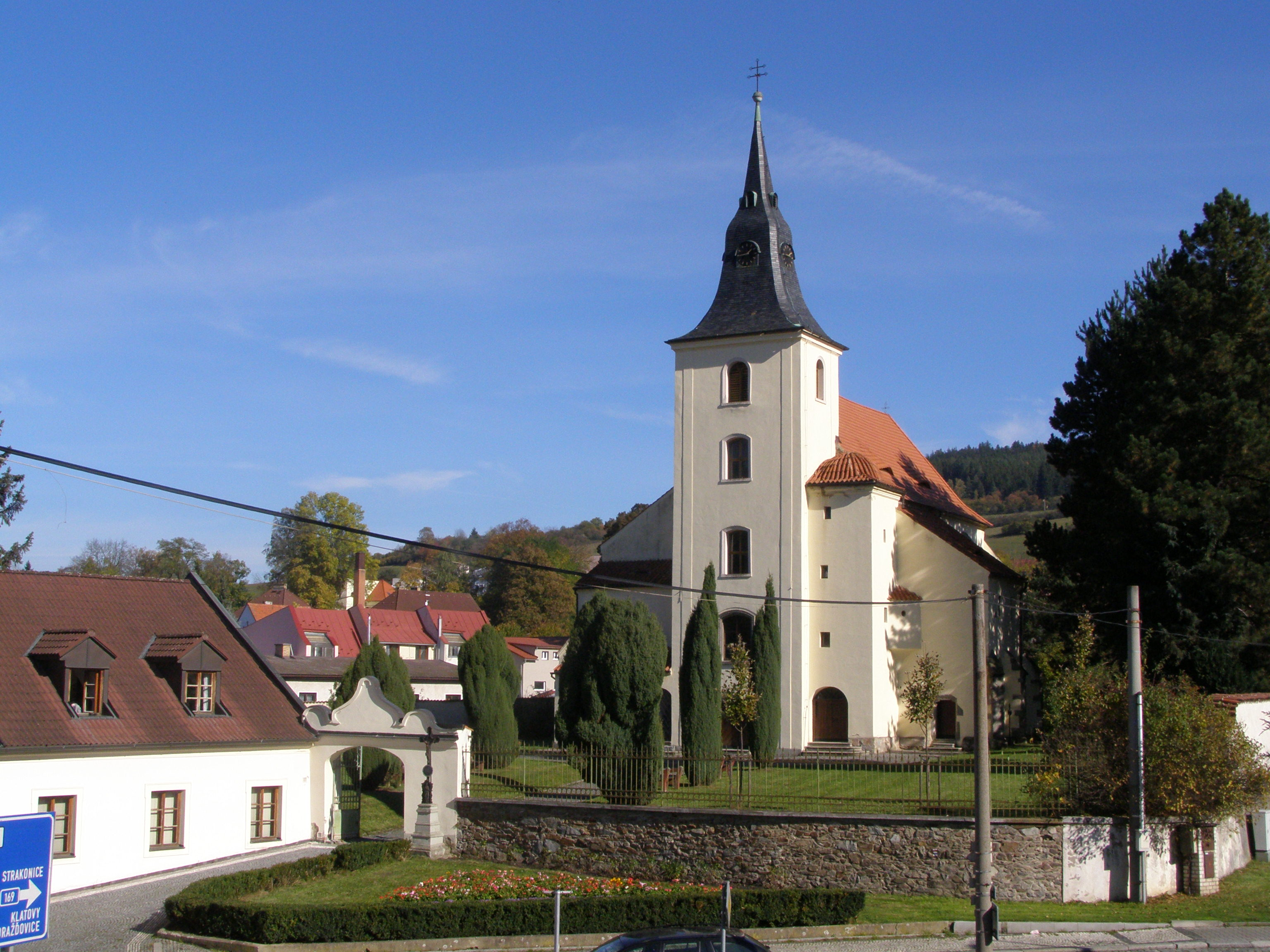 Sušice, ulice Dlouhoveská, kostel Nanebevzetí Panny Marie